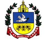 Brasão do Município de Igrejinha, RS, Brasil